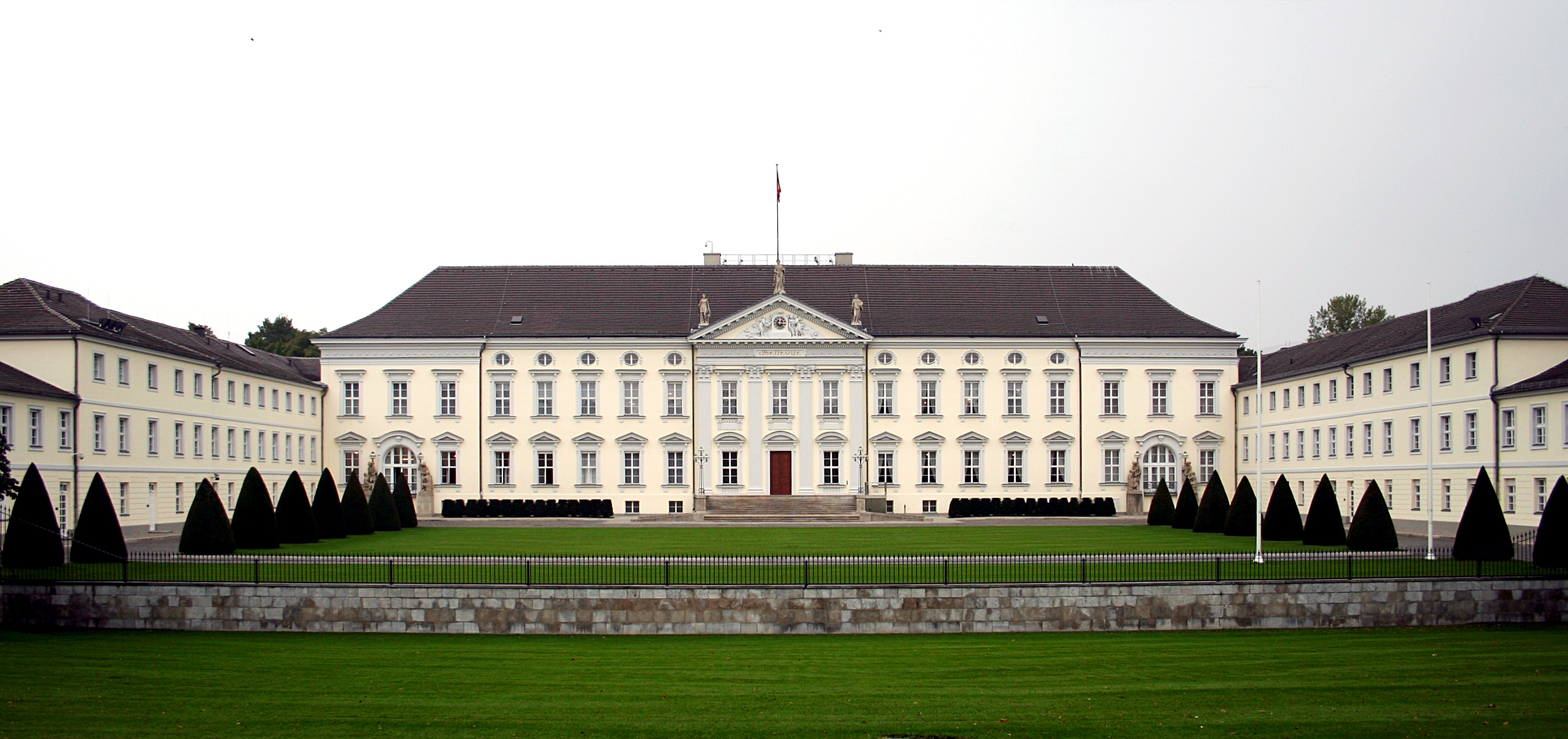 Schloss Bellevue, Berlin, Germany